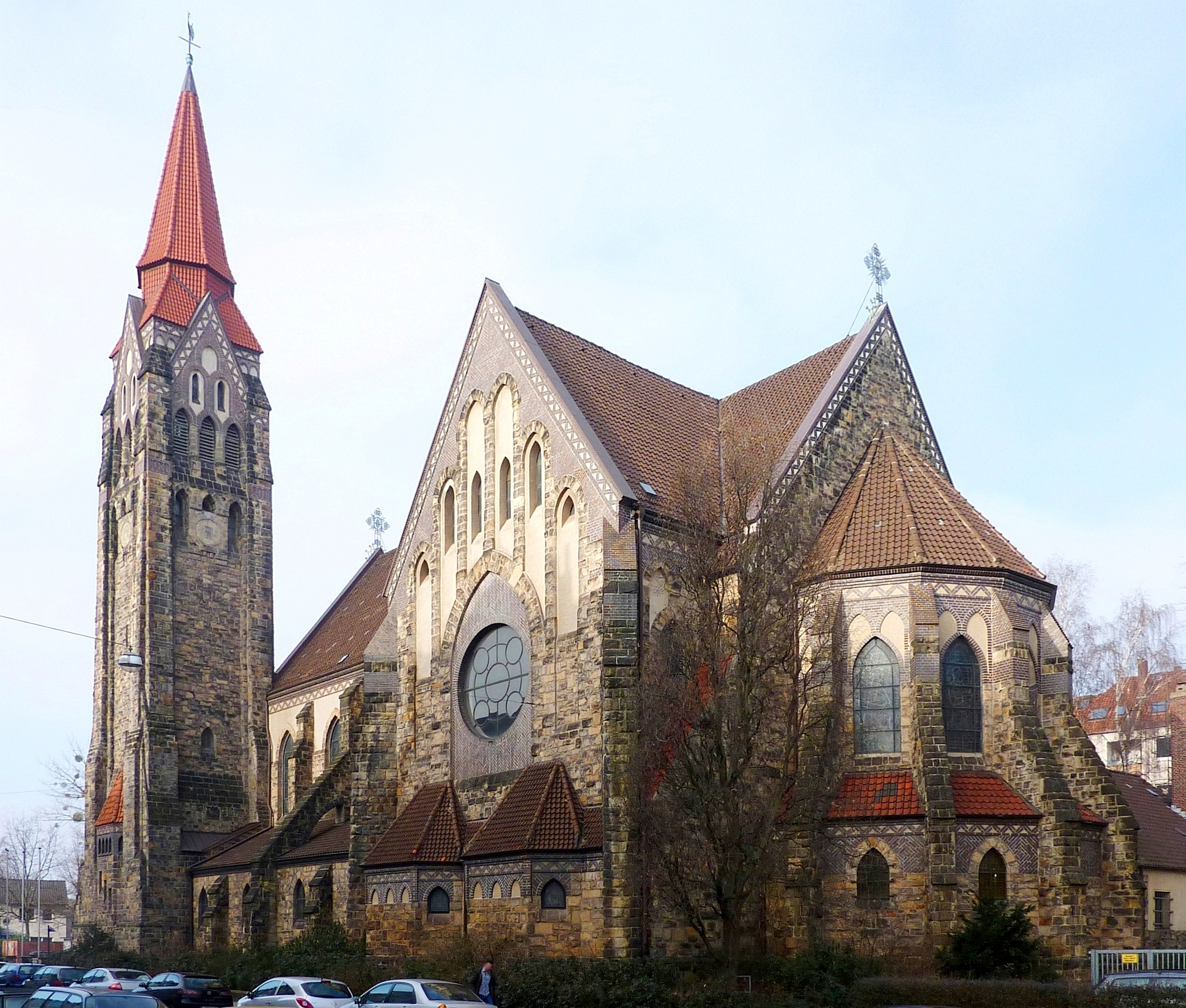 St.-Joseph-Kirche (Steinmetzstr. 1) in der List, Hannover